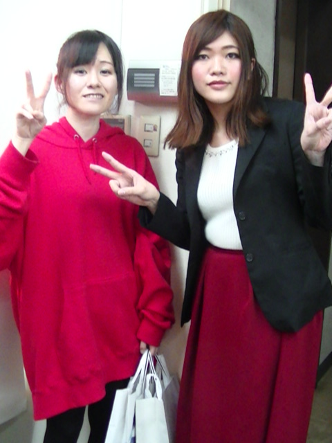 大吟嬢 (2018年4月)